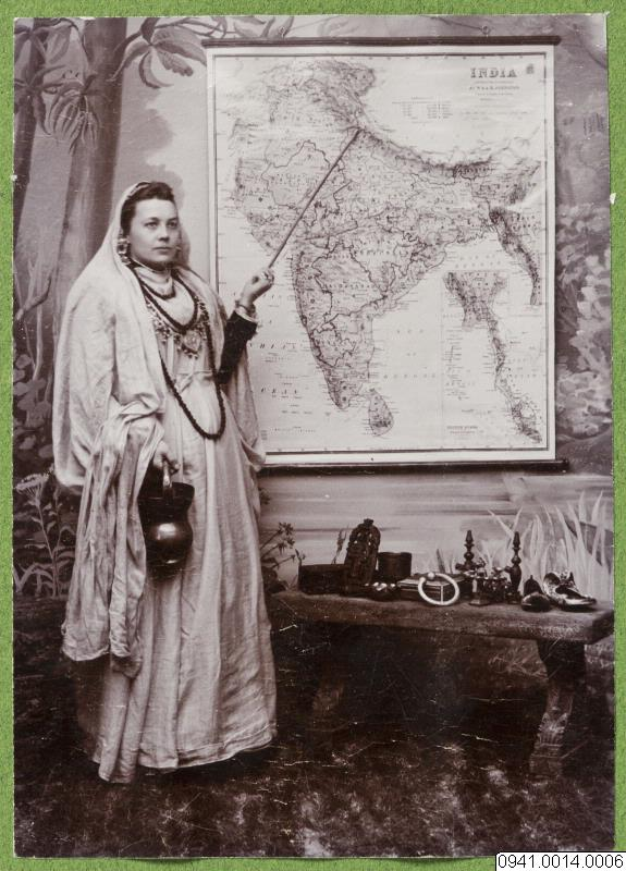 Bild från ett fotoalbum om Mathilda Strömberg Hamilton. Okänd fotograf, fotonr 0941.0014.0006, Statens museer för världskultur - Etnografiska museet